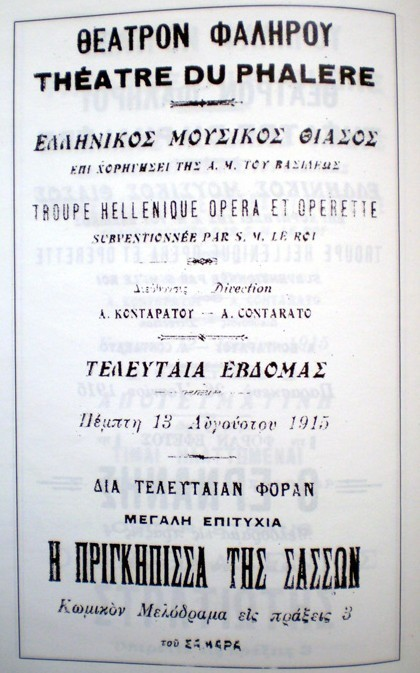 Η πριγκήπισσα της Σασσών, θεατρικό έργο του 1915